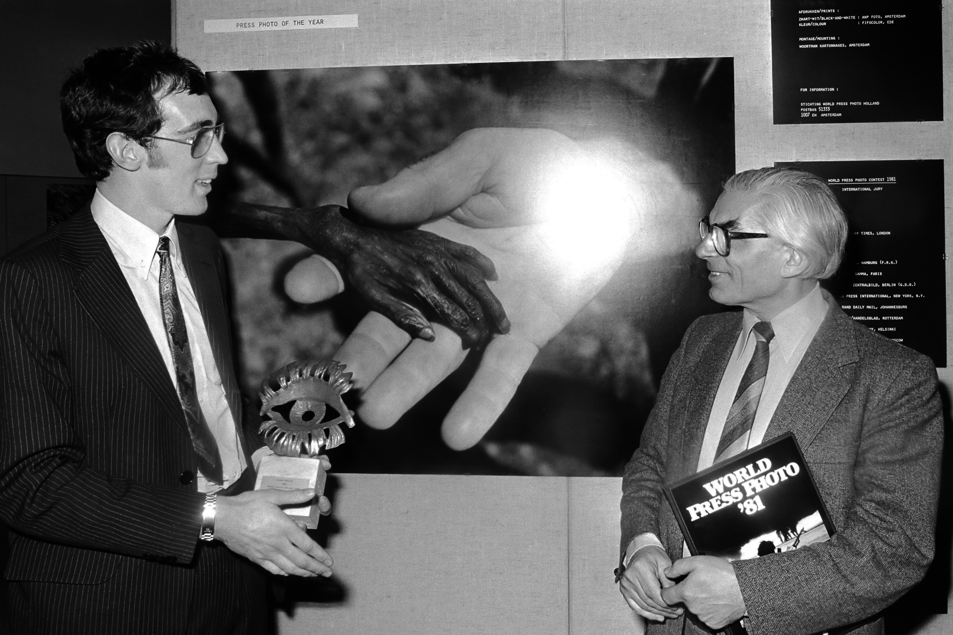 Uitreiking prijzen World Press Photo door Polak (burgemeester) in Amsterdams Tropenmuseum aan Engelse fotograaf Mike Wells 8 april 1981